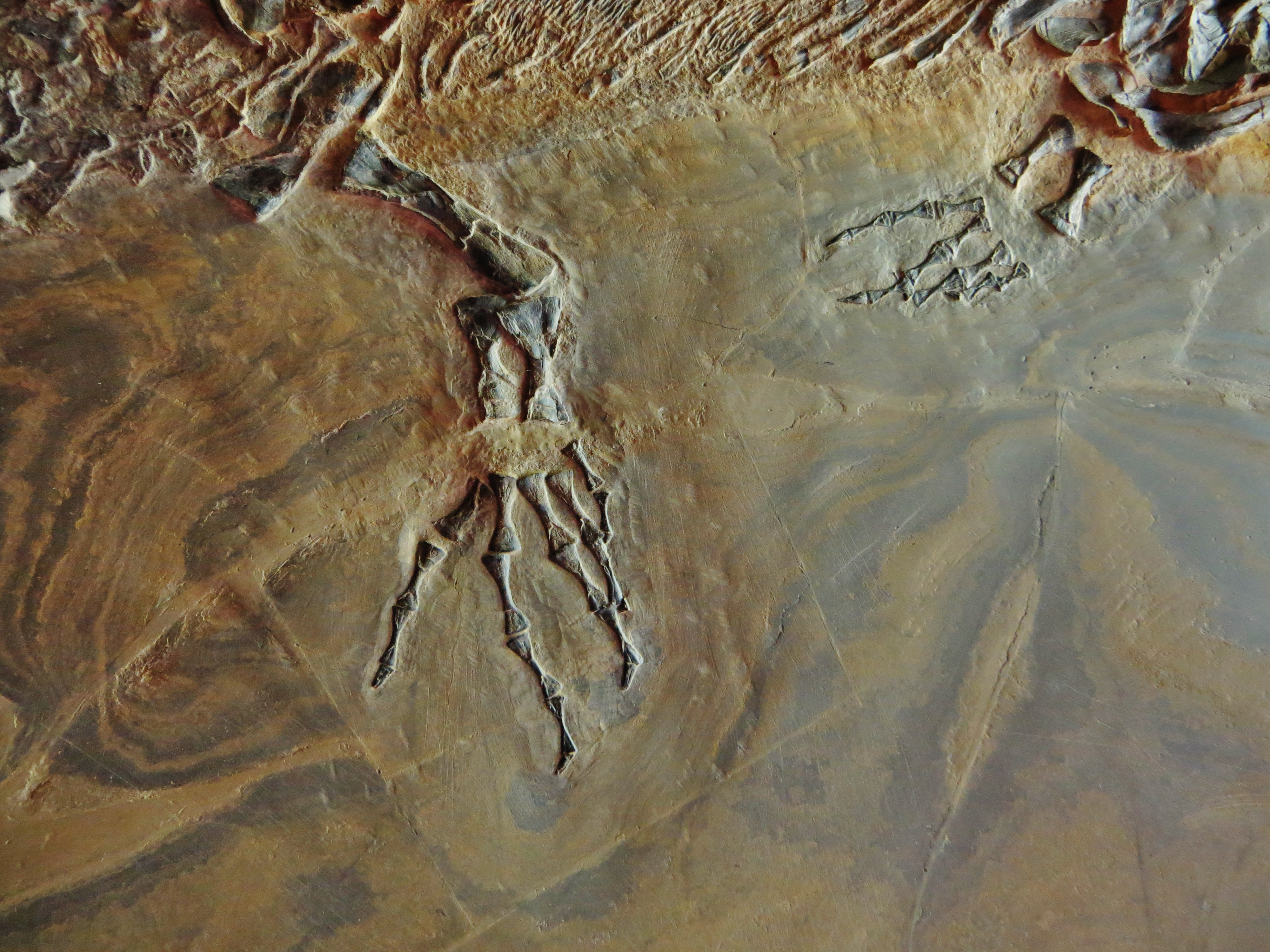 Fossil of Sclerocephalus- Took the picture at Natural History Museum, Mainz